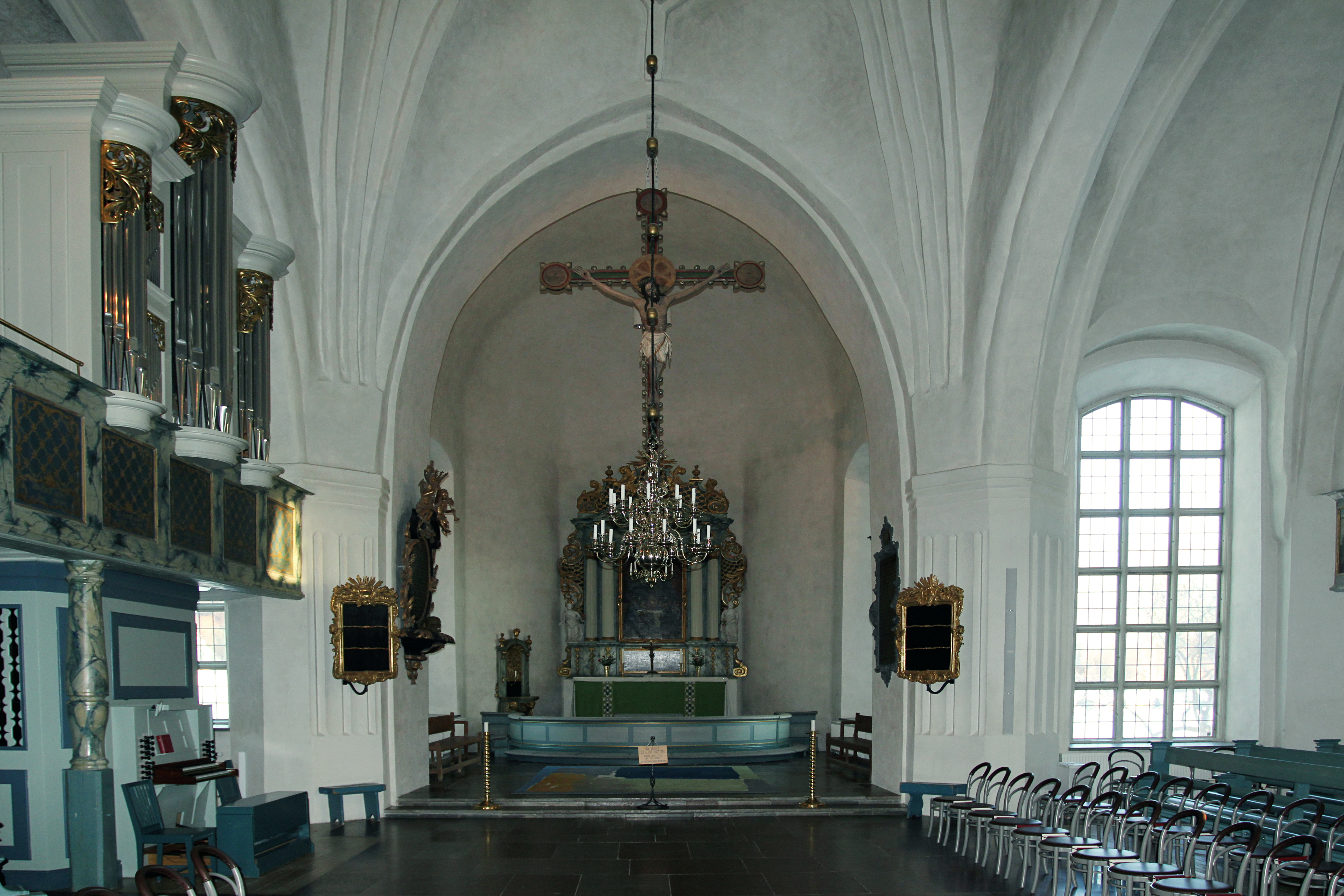 Leksands kyrka, Dalarna, Sverige